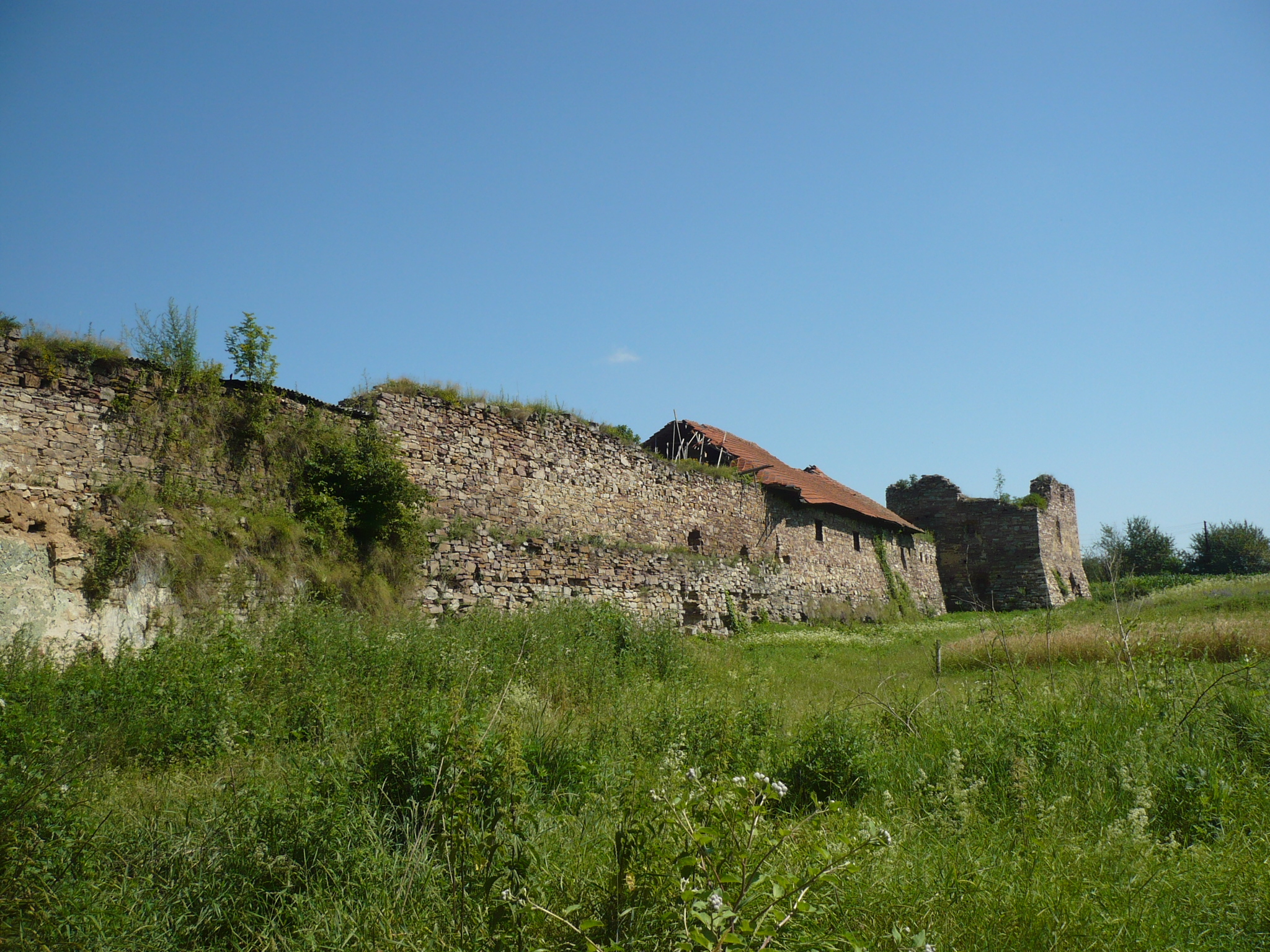 Potok Złoty. Zamek